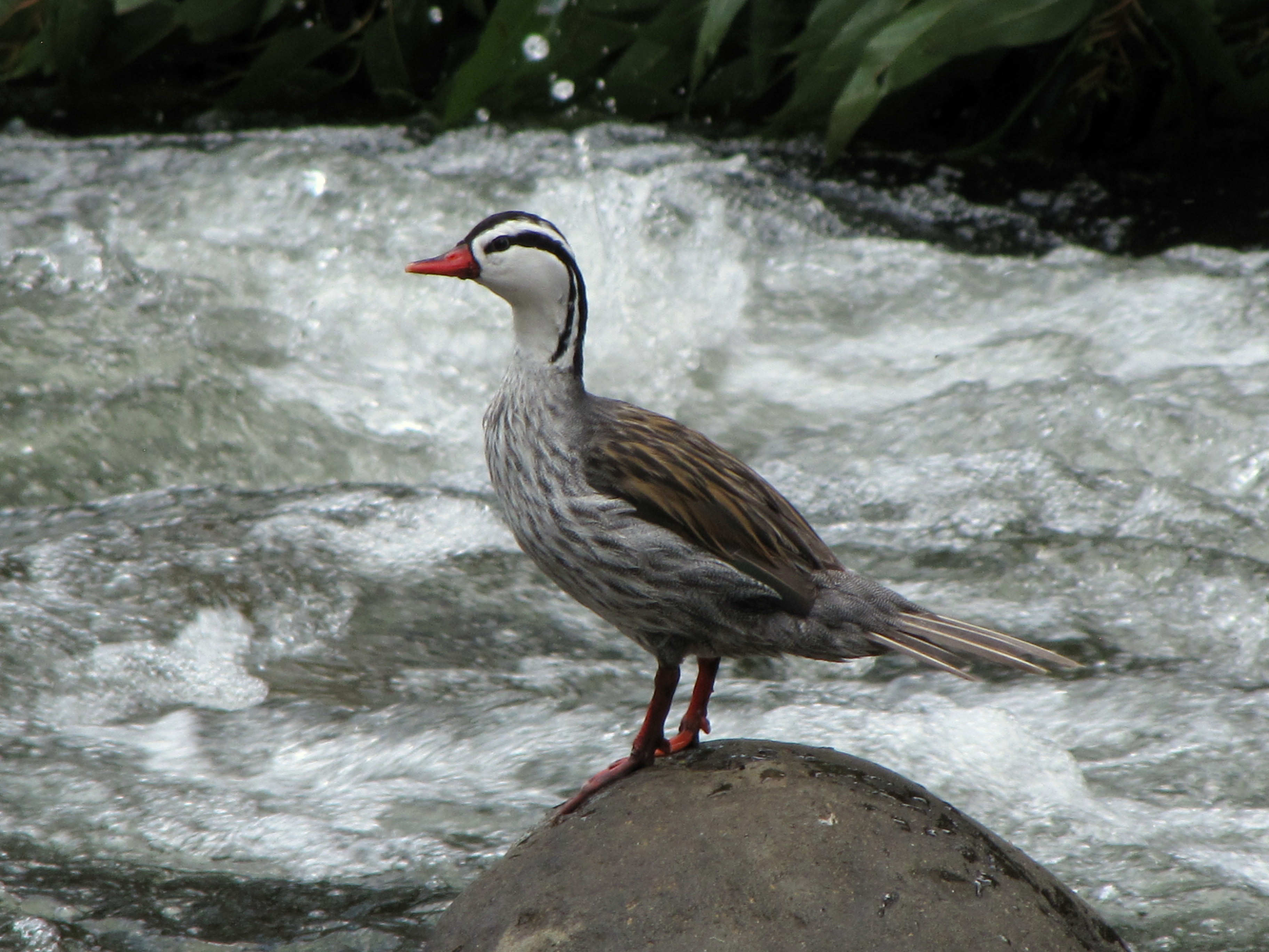 Merganetta armata (Pato de torrente) - Macho